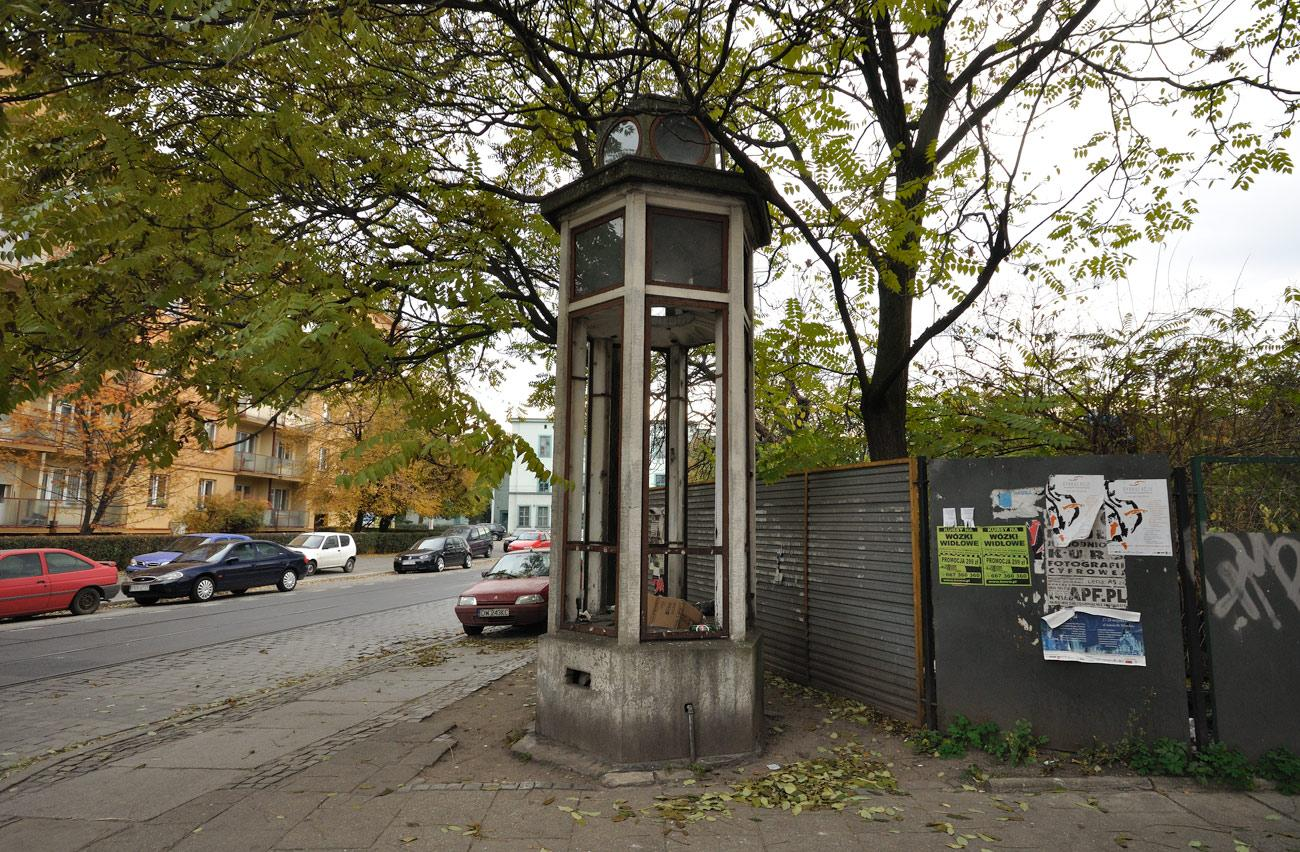 Przedwojenny słup ogłoszeniowy (drewniany na betonowej podstawie) na placu Konstytucji.